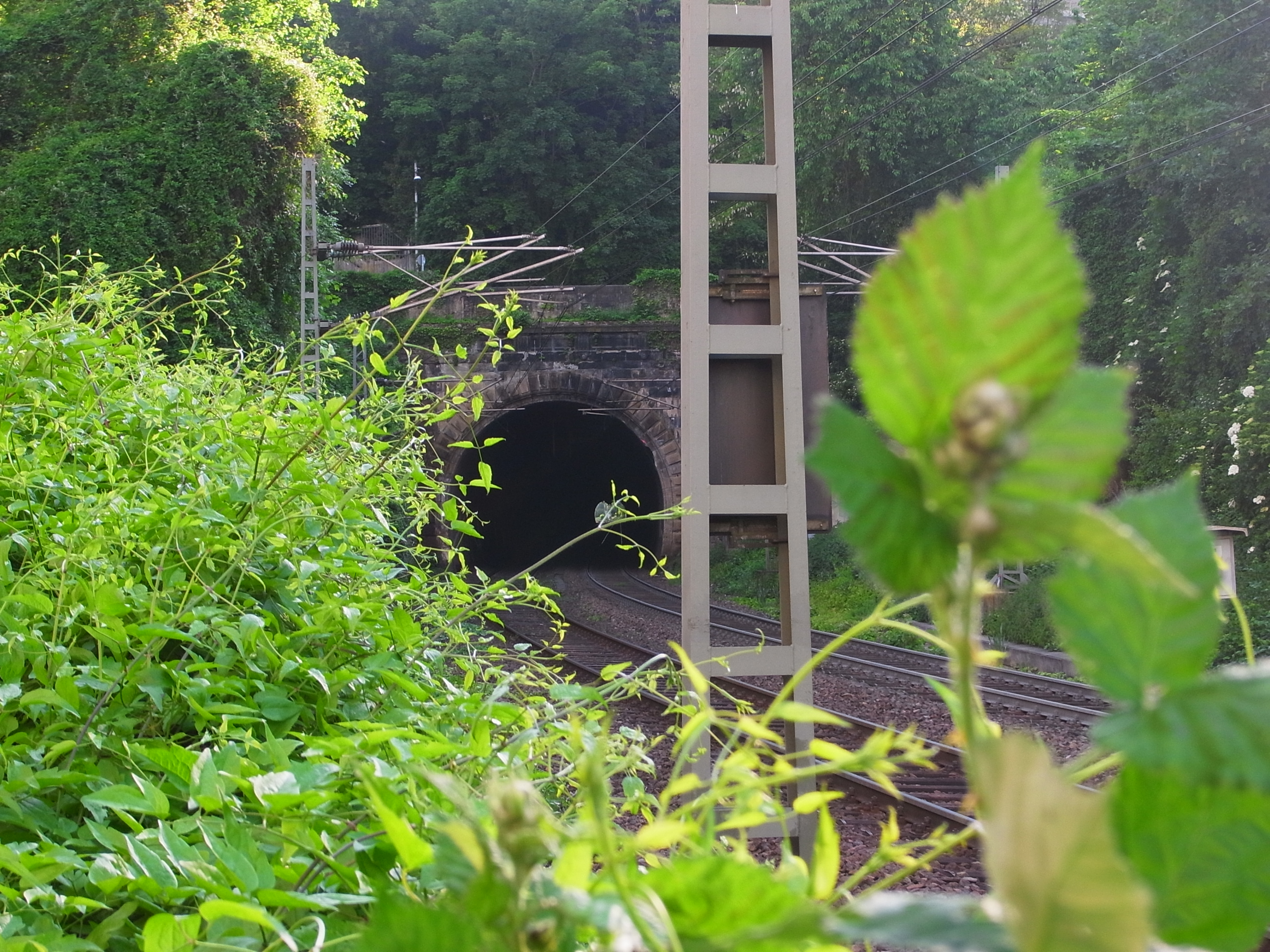 Kriegsbergtunnel (Ostseite von der Mönchhaldenstraße aus gesehen)